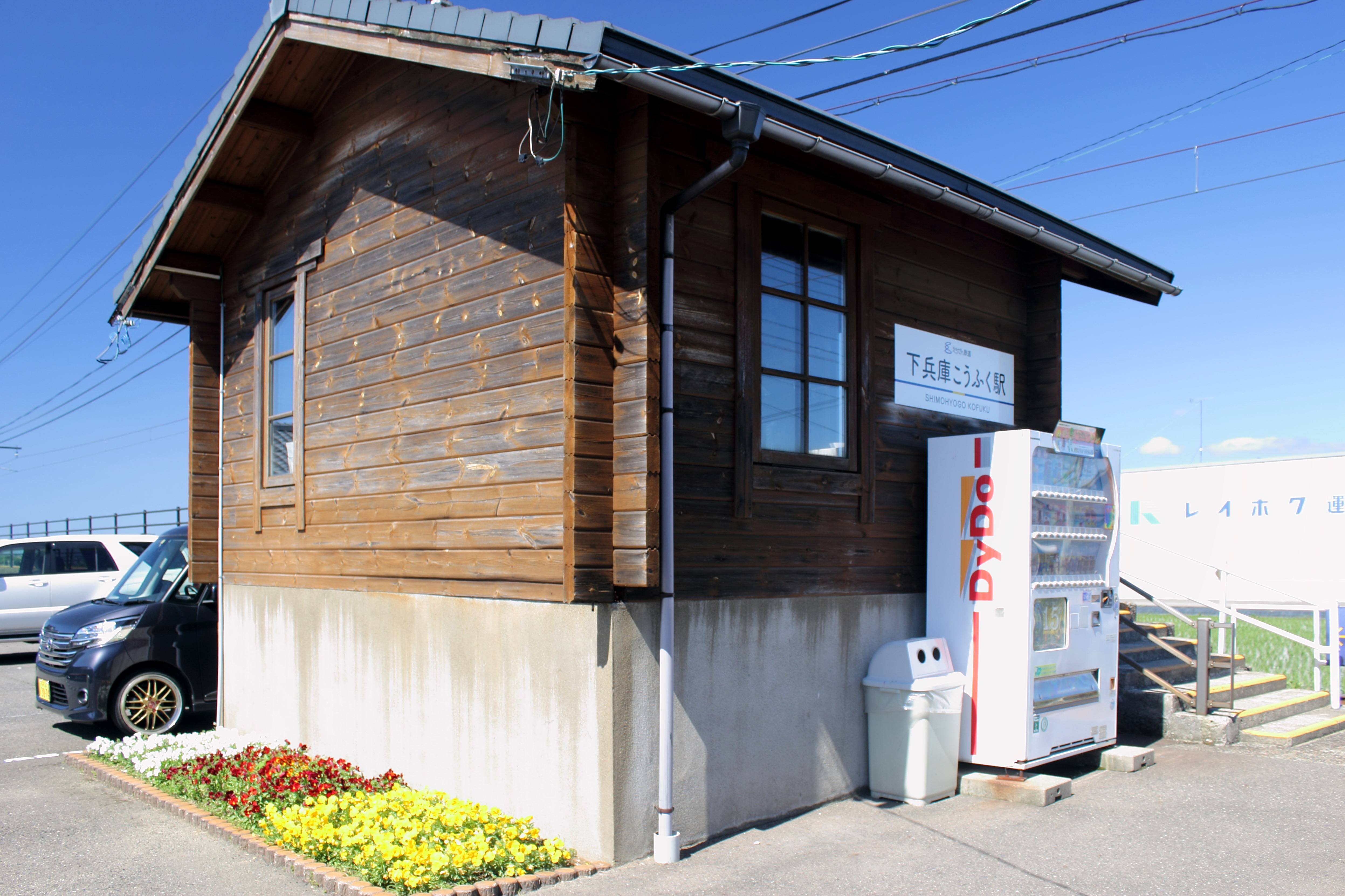 えちぜん鉄道 下兵庫こうふく駅 駅舎